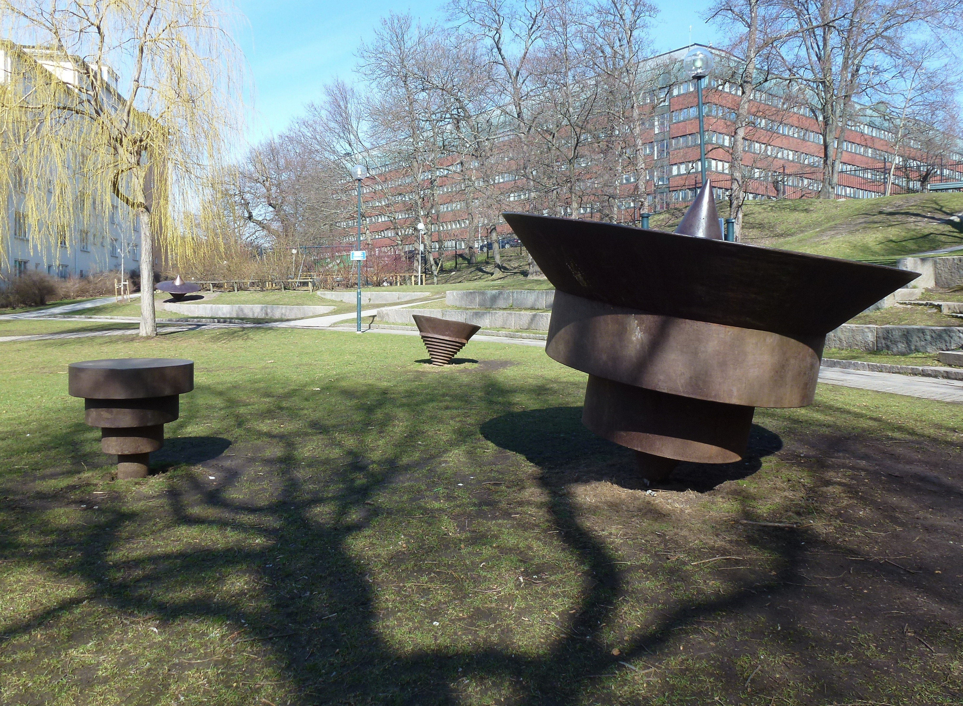 Starrbäcksängen, Gärdet, konstnärlig utsmyckning av Gunilla Bandolin